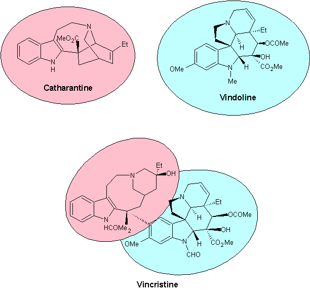 Formule développée de la vincristine, vinblastine et catharantine